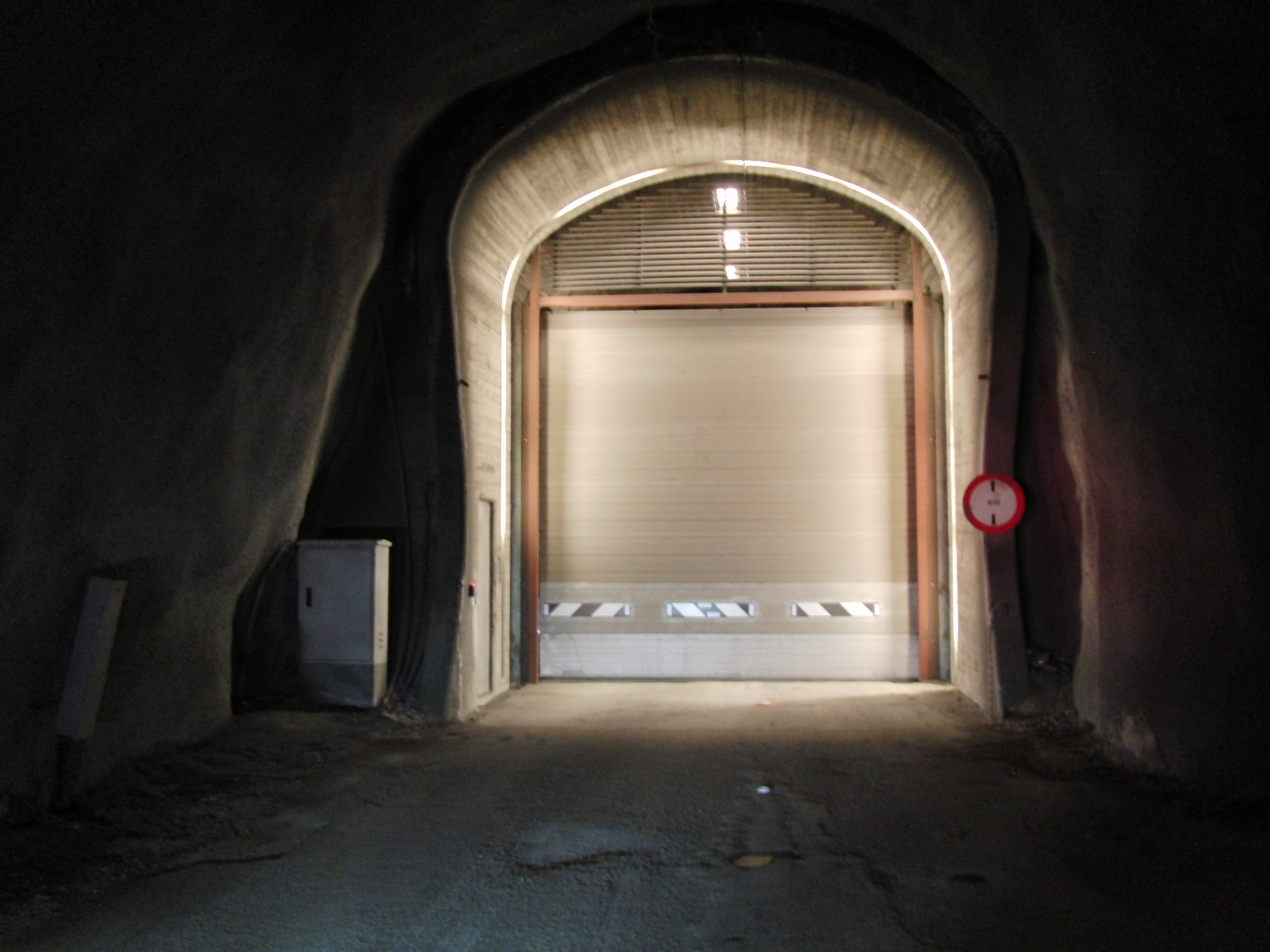 Aurland kraftverk